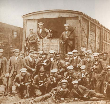 Pociąg pancerny (III powstanie śląskie)